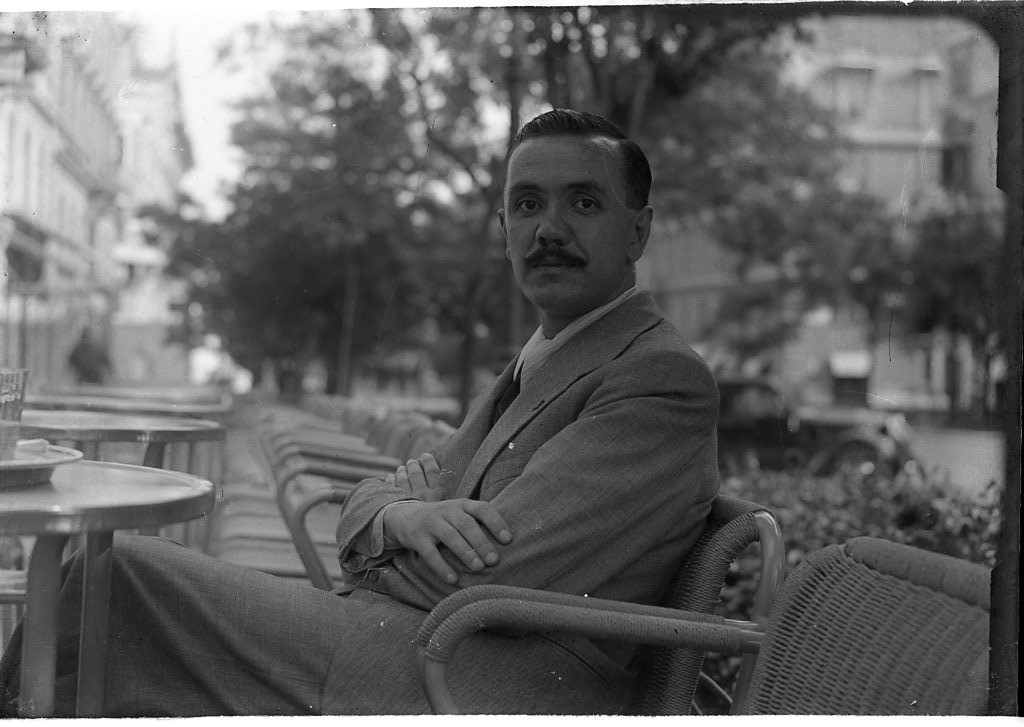 ritratto fotografico dell'artista